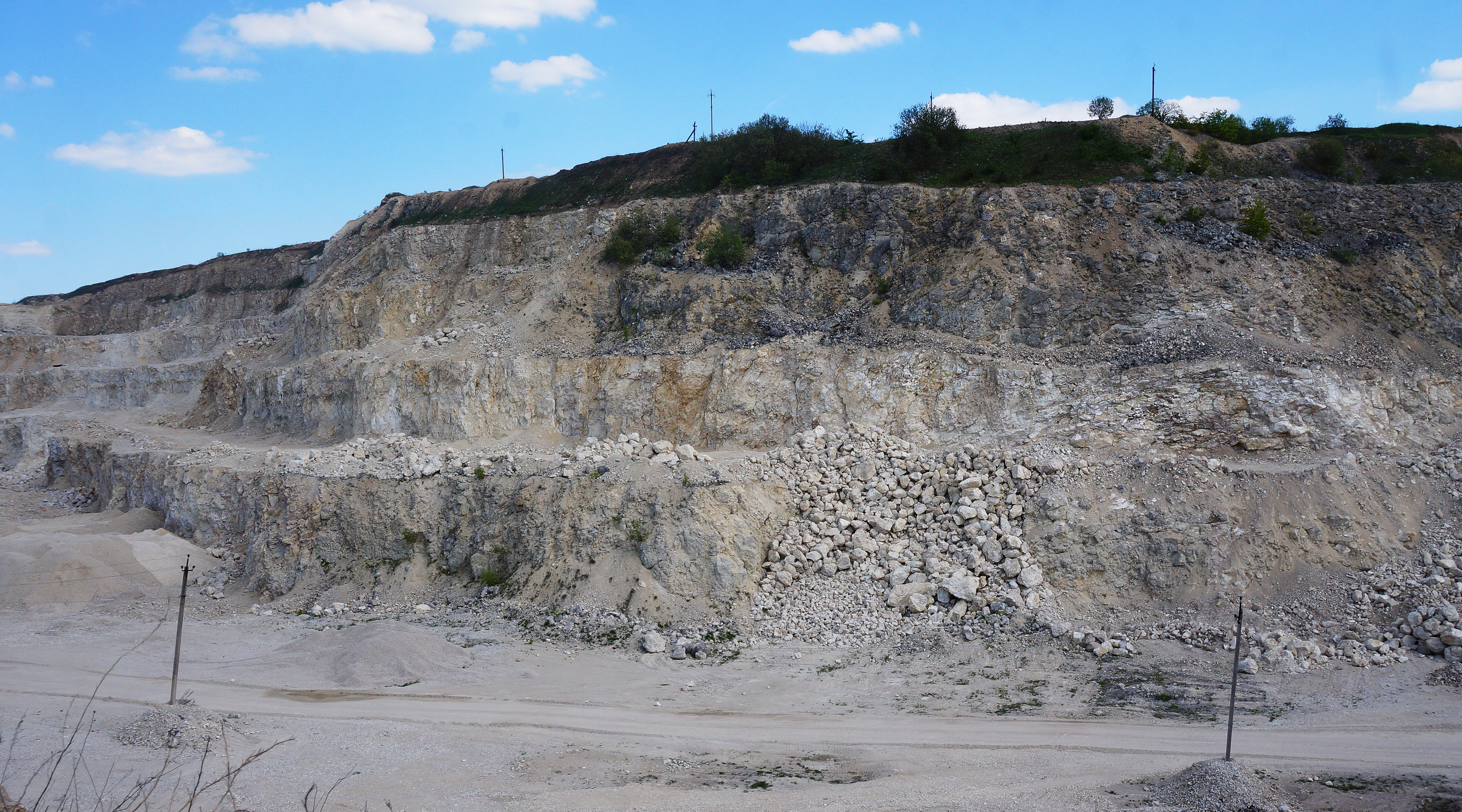 «Останці Сарматського моря», Підволочиський район, с. Галущинці, у кар'єрі біля автошляху Тернопіль-Підволочиськ, стінка північно-західної експозиції